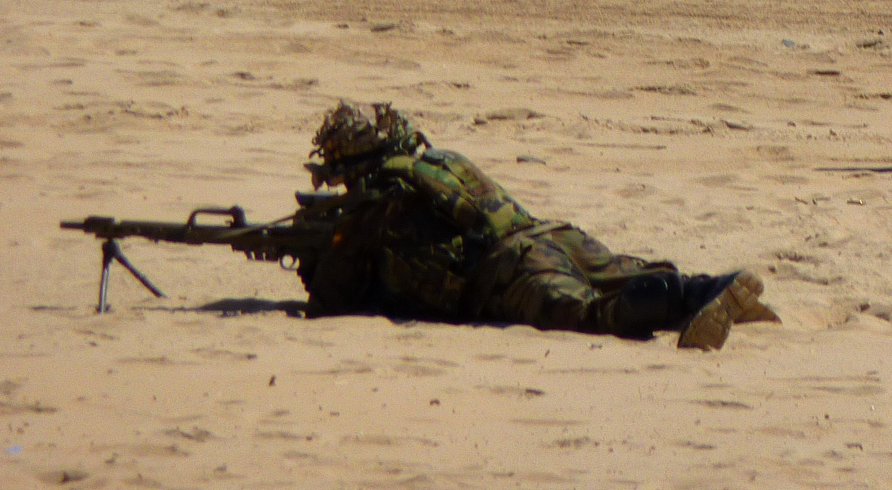 Infante de marina español con una Ameli.